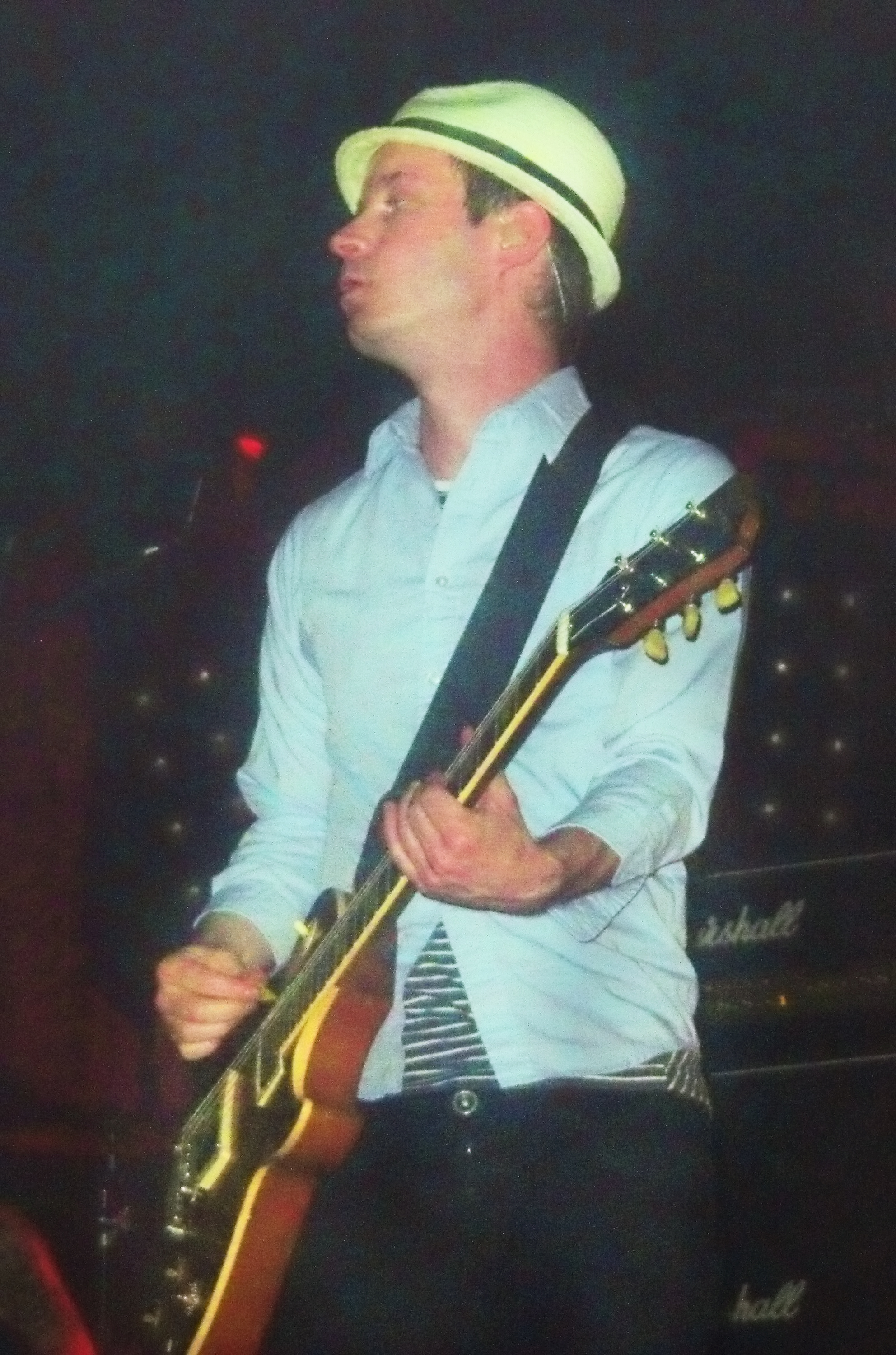 Sum 41 в Москве